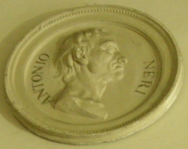 Specola, medaglione di antonio neri